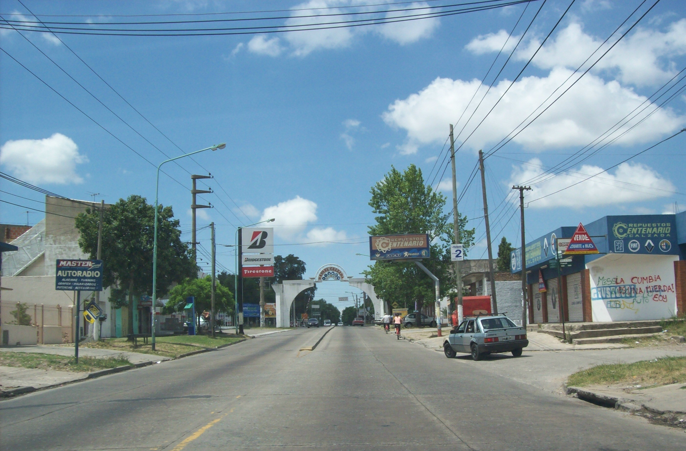 Arco de acceso a la Ciudad de Rafael Calzada en la Avenida San Martín. Dicha ciudad se encuentra en el Partido de Almirante Brown, Provincia de Buenos Aires, Argentina.